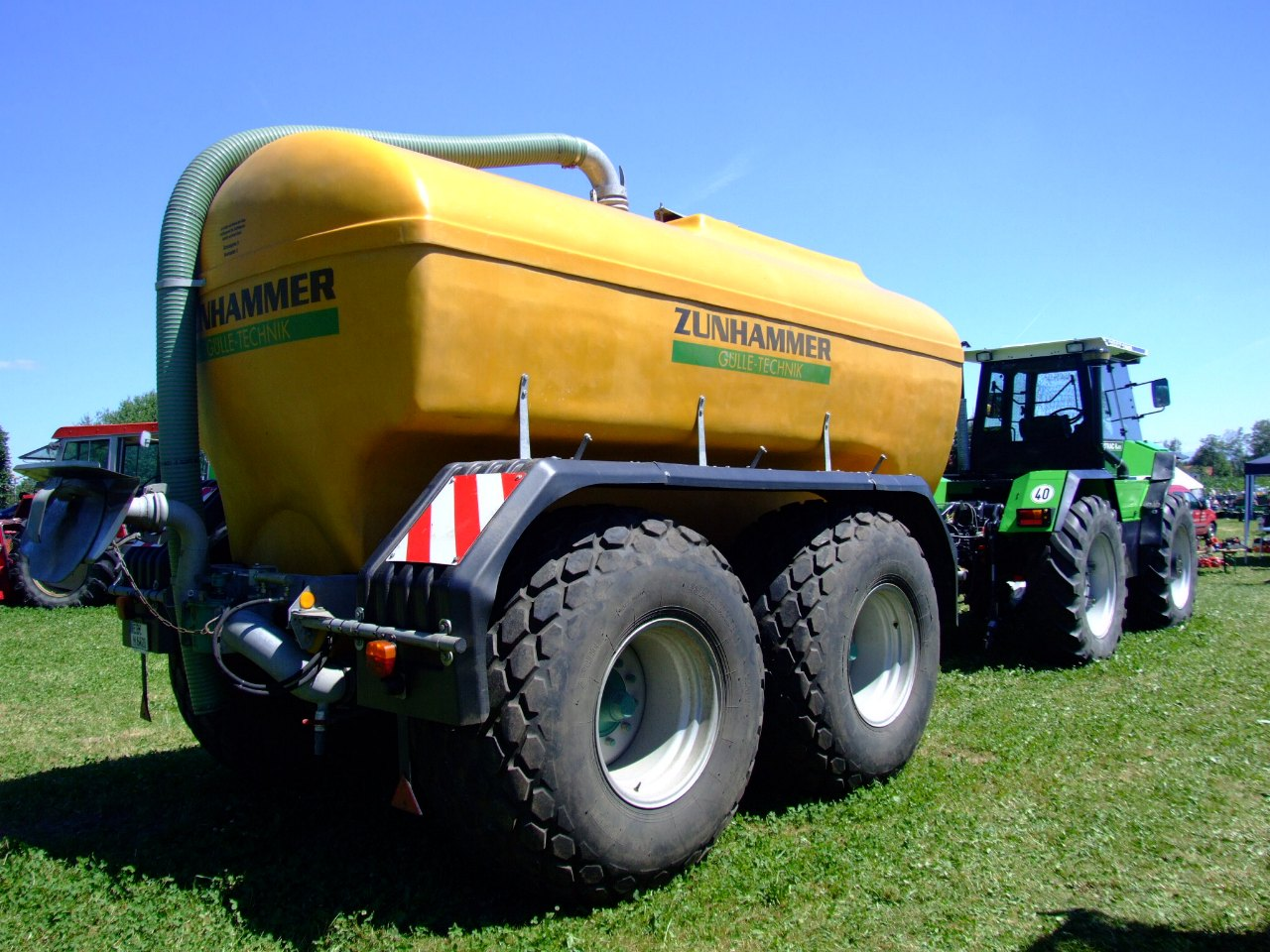 Zunhammer Gülle-Technik, Gülle-Tankwagen hinter einem Deutz-Fahr INTRAC 6.60